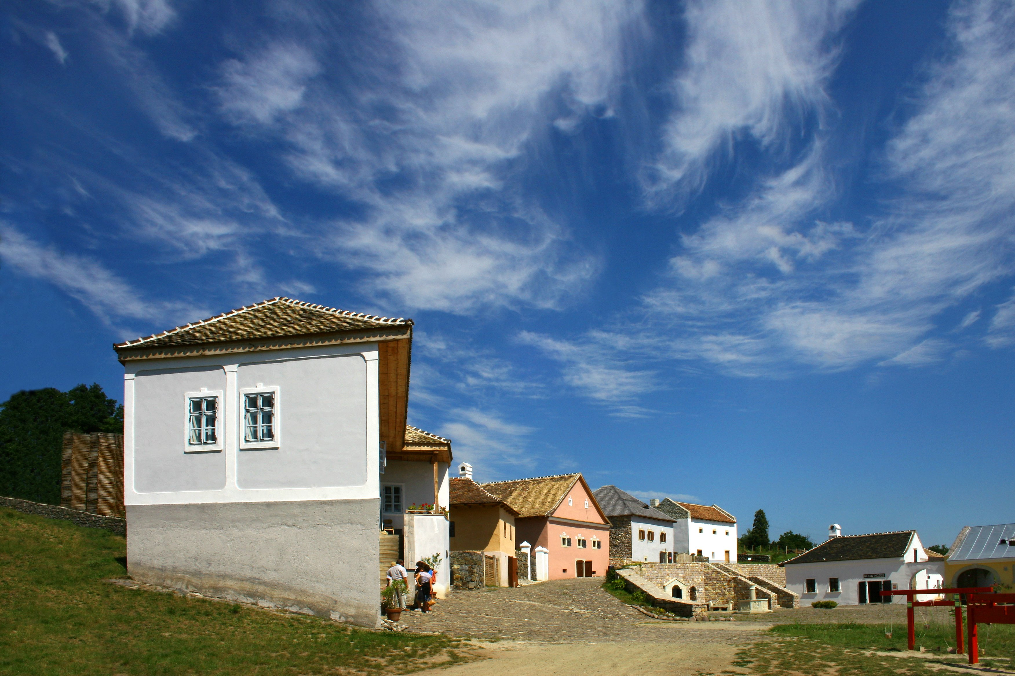 Felföldi mezőváros tájegység